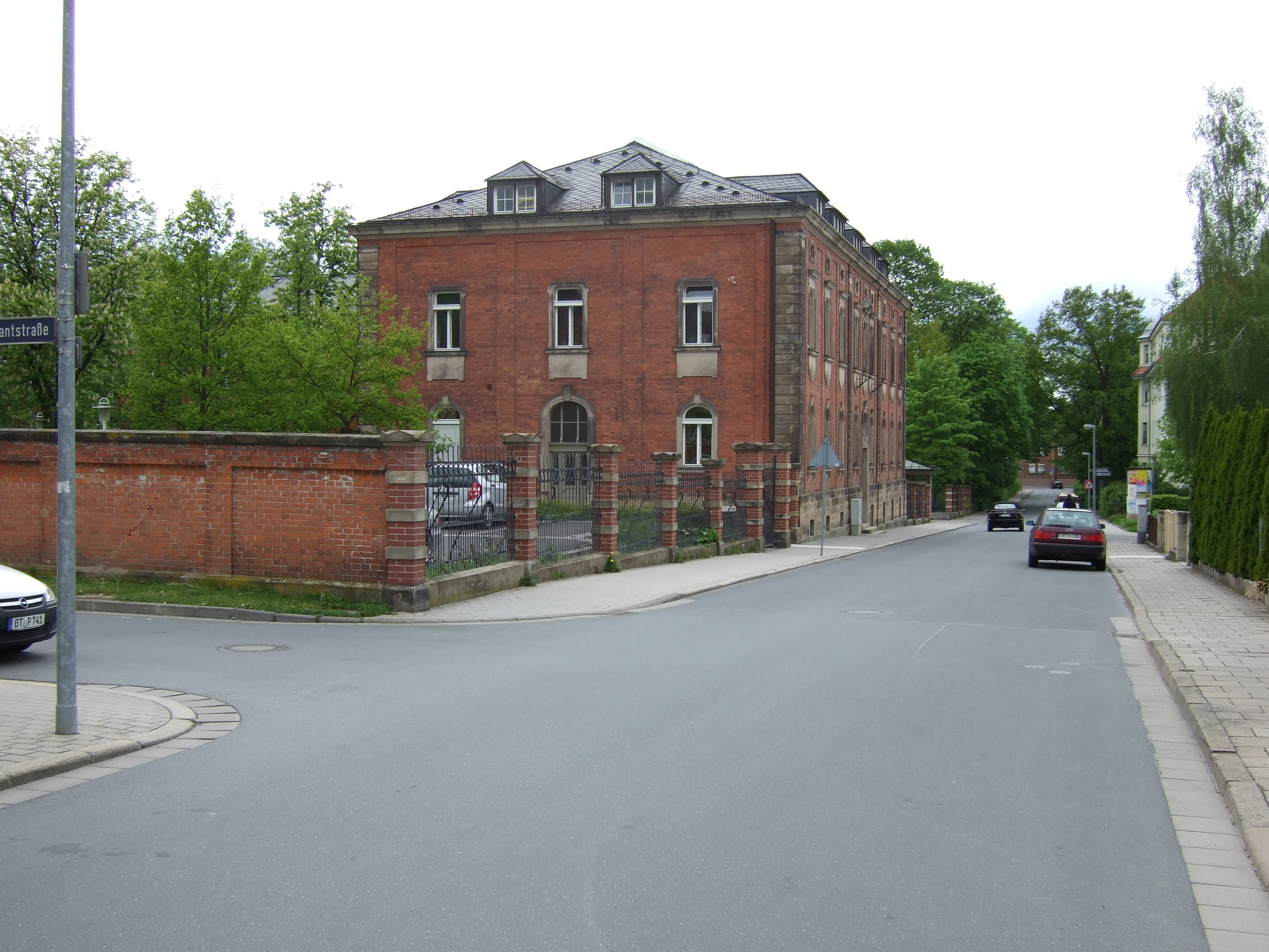 Bayreuth Hegelstraße, ehemaliges Garnisonslazarett